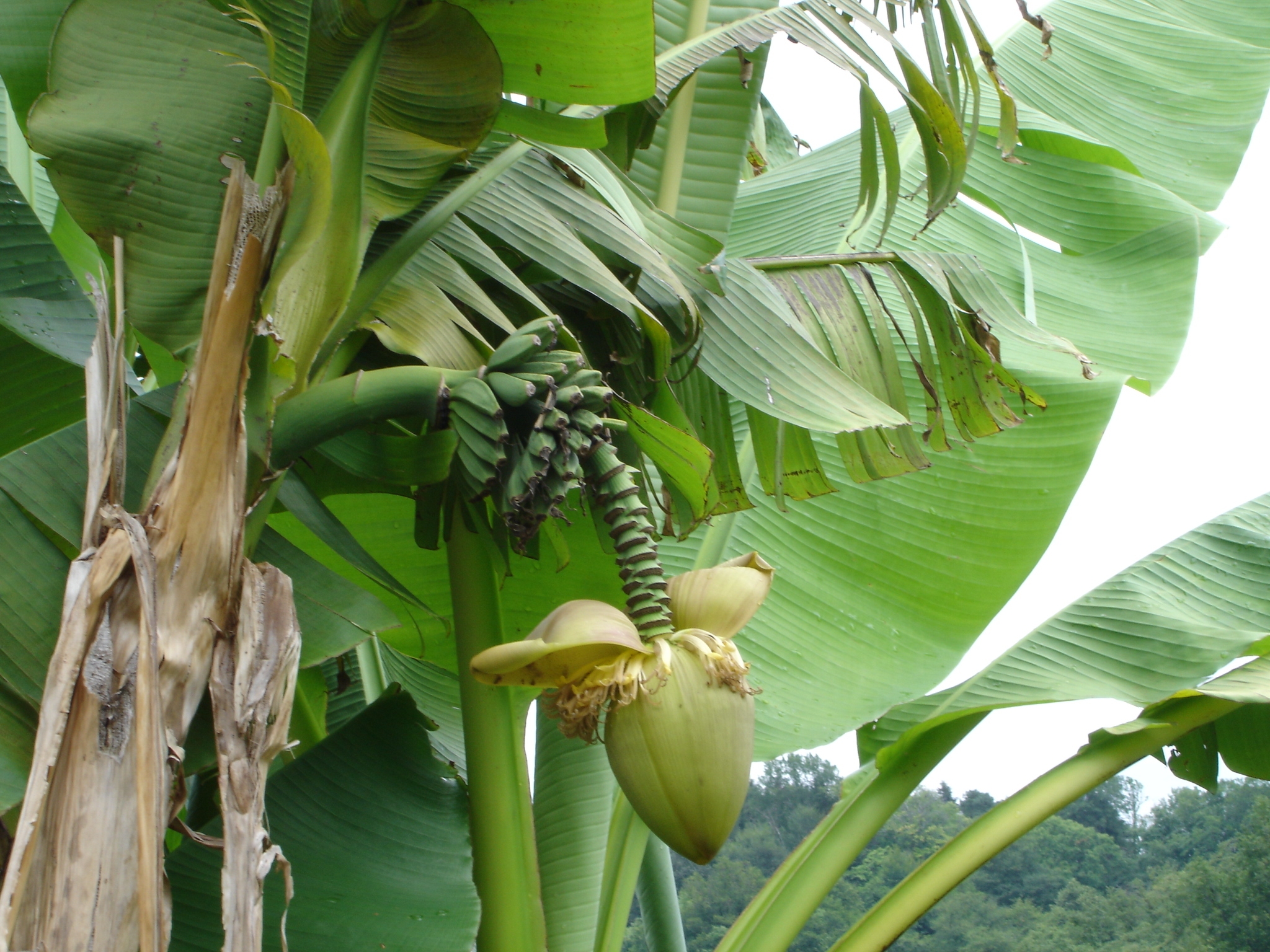 Бананы в Батумском ботаническом саду